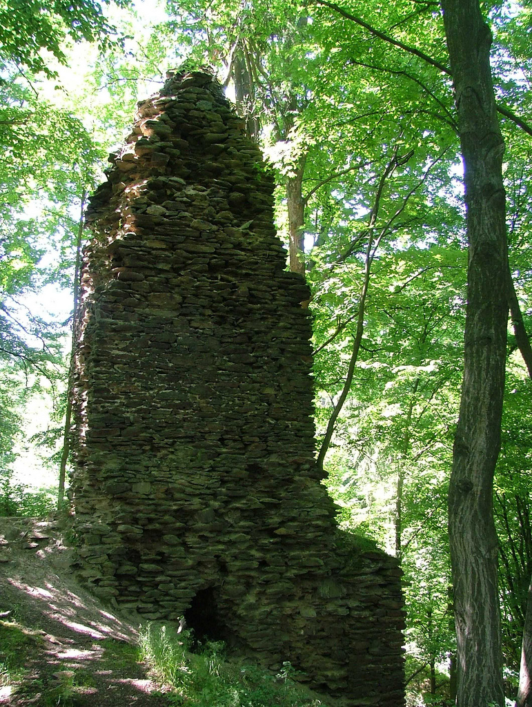 Pyšolec